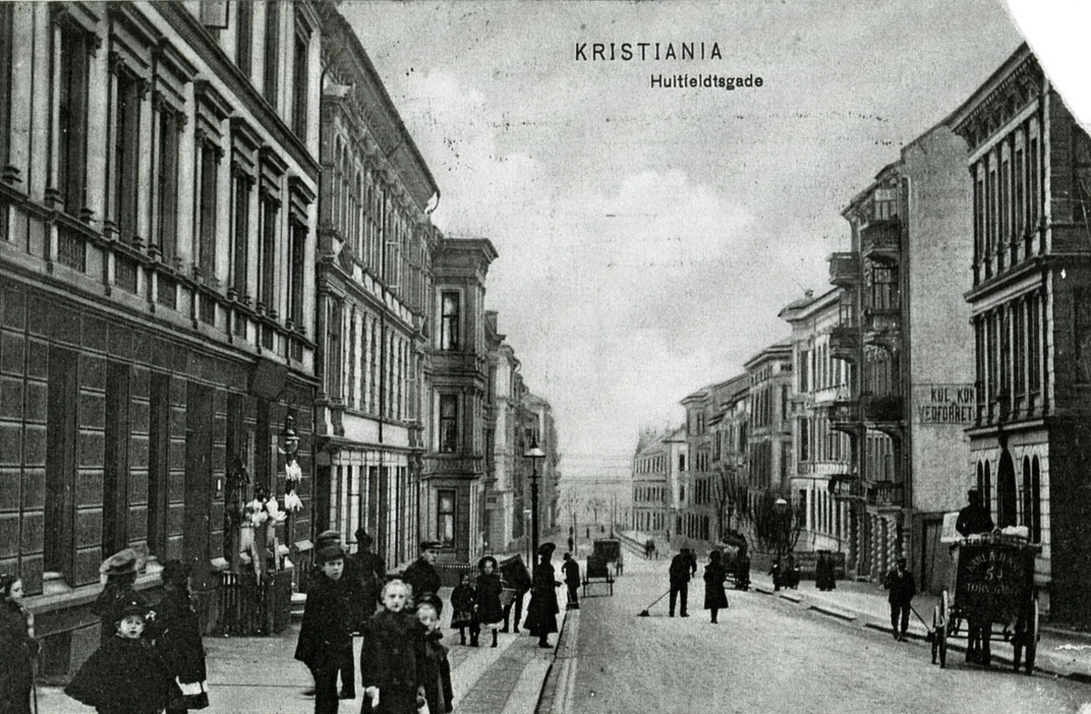 Huitfeldts gate nedenfor Løkkeveien. Ukjent fotograf, fra Oslo byarkivs samling. Tekst i Digitalt museum: «Gamle Ruseløkka med leiegårder. Huitfeldts gate sett mot sjøen, nedenfor krysset mot Løkkeveien. Hest og kjerrer i gata, gatefeiere, barn. Huset ved hestekjerren er nr. 15. Neste bygg, nr. 19, er revet i dag, og der ligger bygget til Landsforeningen for hjerte og lungesyke. Nr. 21 er også revet og nybygg kommet opp. Husene på venstre side står i dag, bortsett fra nr. 18 som stikker litt ut i bildet og nr. 20, der kom i sin tid nybygg til Oslo Tekniske skole. Postkort?»